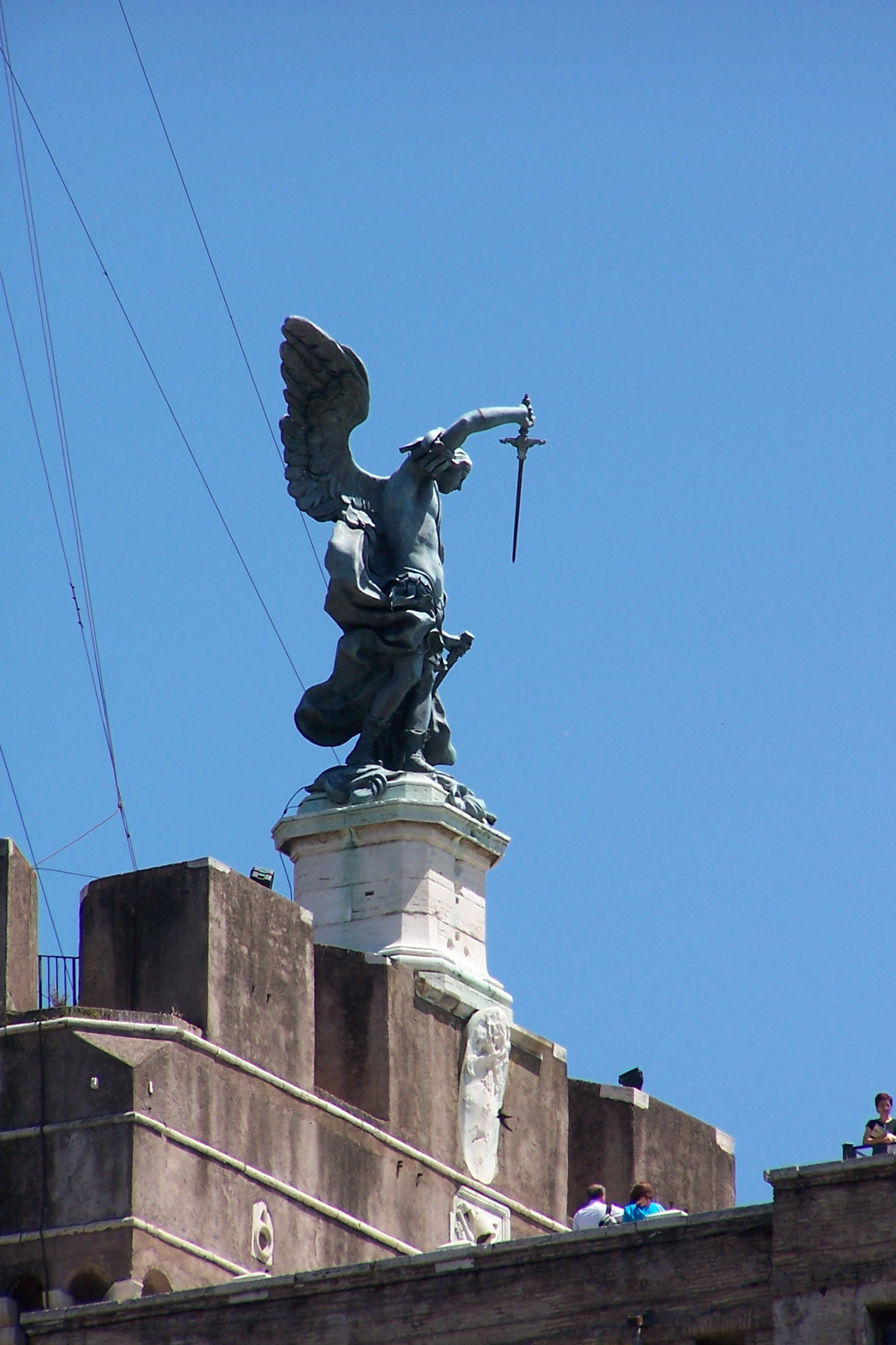 Rom, Der Engel auf der Engelsburg